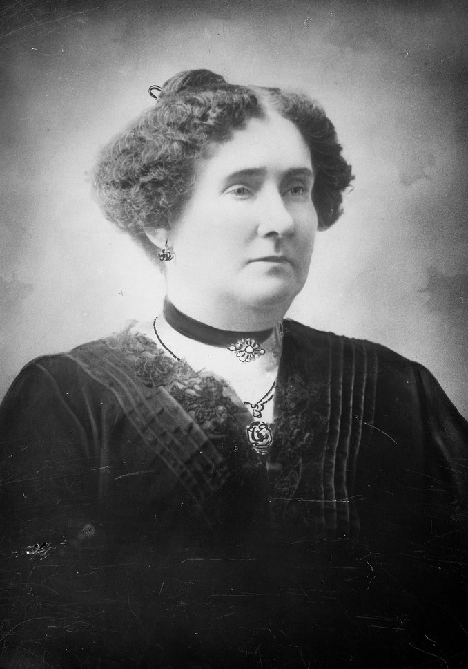 Hortensia Mata Lamota de Ordóñez Primera dama de Cuenca